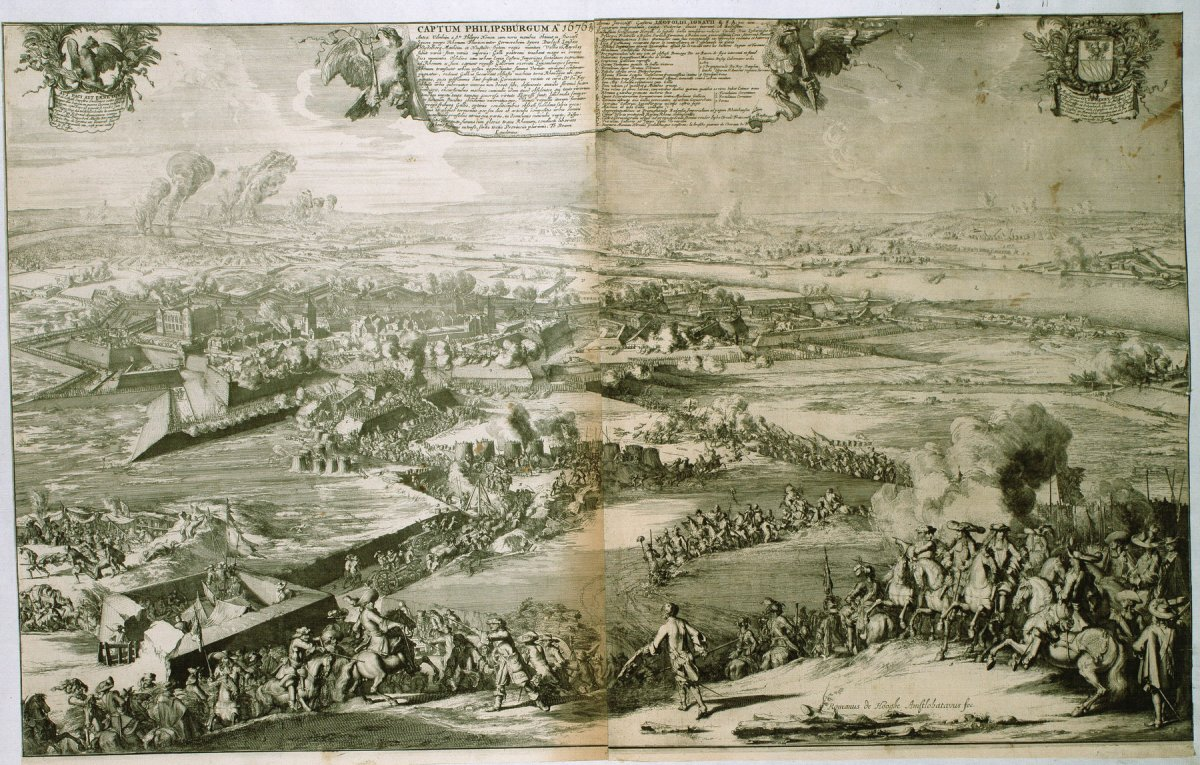 Kupferstich über die Belagerung der Festung Philippsburg 1676